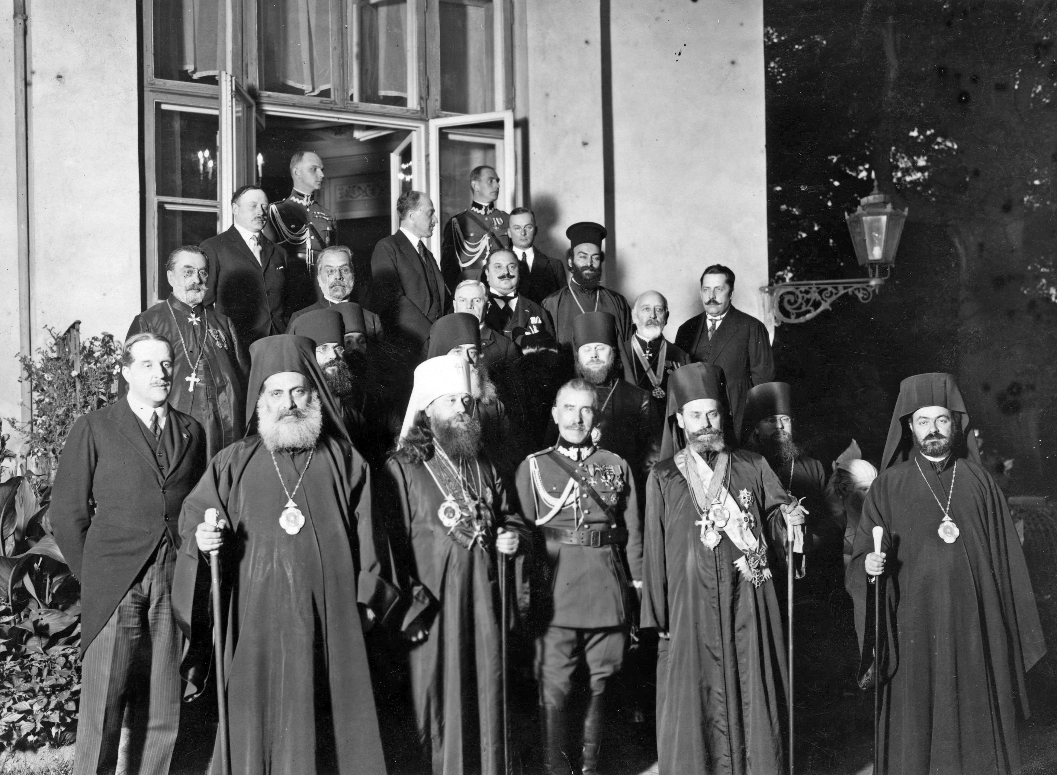 Delegaci PAKP oraz Patriarchatu Konstantynopolitańskiego przed Belwederem w dniu ogłoszenia autokefalii Kościoła prawosławnego w Polsce. Dostojnicy kościelni przed Belwederem po audiencji u prezydenta RP Stanisława Wojciechowskiego. Widoczni w pierwszym rzędzie od lewej do prawej: metropolita chalcedoński Joachim, metropolita Kościoła Prawosławnego w Polsce Dionizy Waledyński, adiutant prezydenta RP Stanisława Wojciechowskiego gen. Mariusz Zaruski, metropolita Nektariusz, metropoliota z Sardes Germanos. Widoczni także m.in: archimandryta Bukowiny Timoteus Evangelinidas (w trzecim rzędzie od góry pierwszy z prawej), profesor Uniwersytetu w Bukareszcie Demetrescu (w trzecim rzędzie od góry w środku, z siwymi włosami), szef protokołu dyplomatycznego MSZ Stefan Przeździecki (1. z lewej w drugim rzędzie). Na najwyższym stopniu stoją adiutanci prezydenta RP kapitan Janusz Horodecki (z lewej) i major Andrzej Meyer (z prawej).